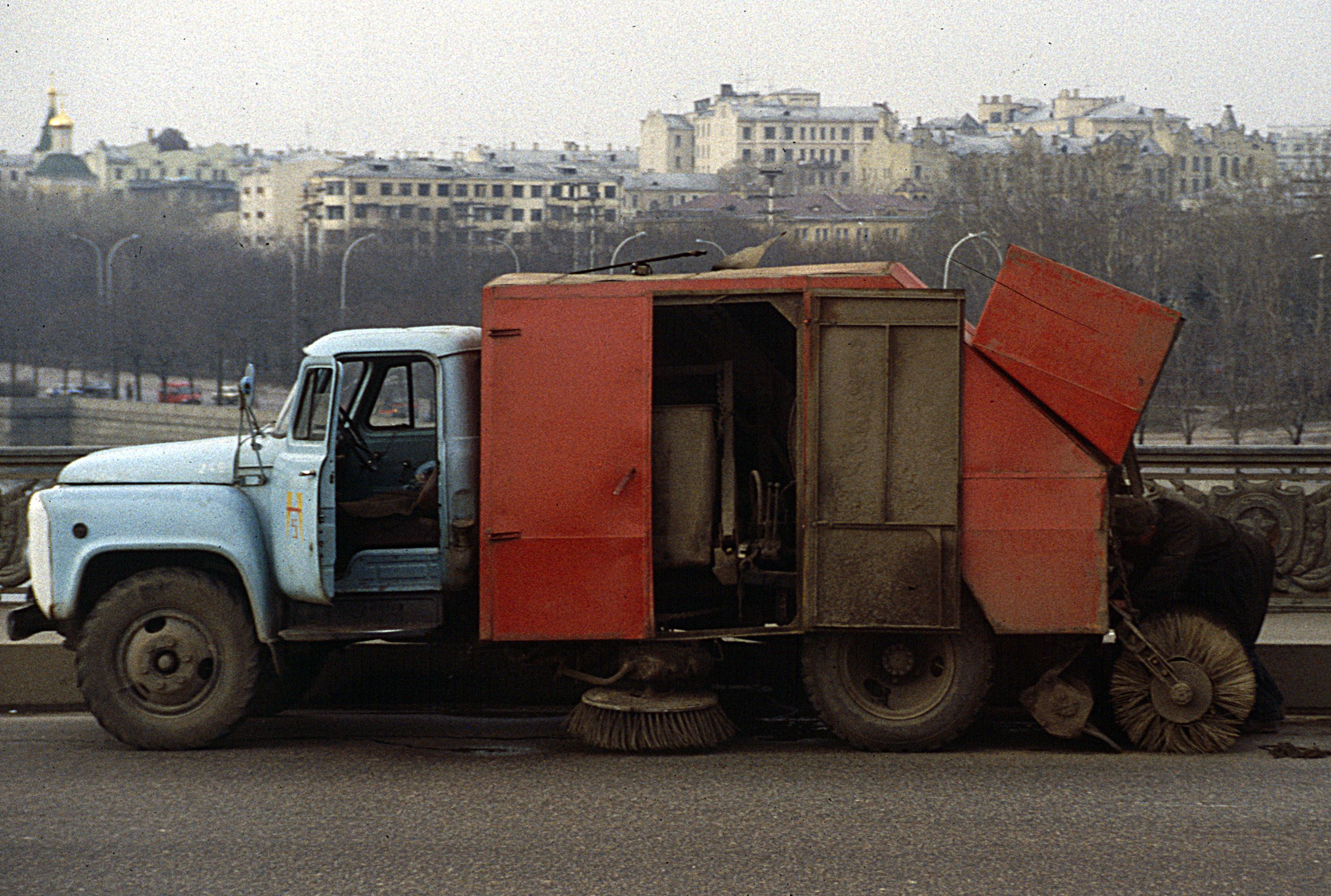 Moskau: auf der Moskwa-Brücke